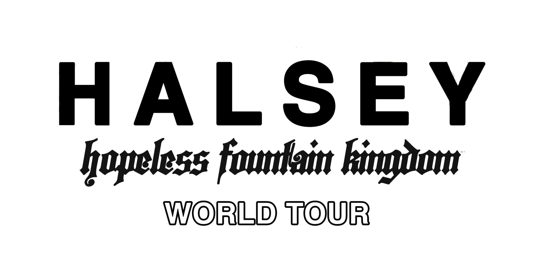 Imagen creada mediante editores de computador basada en el logo de la gira mundial Hopeless Fountain Kingdom World Tour de la cantante Halsey.